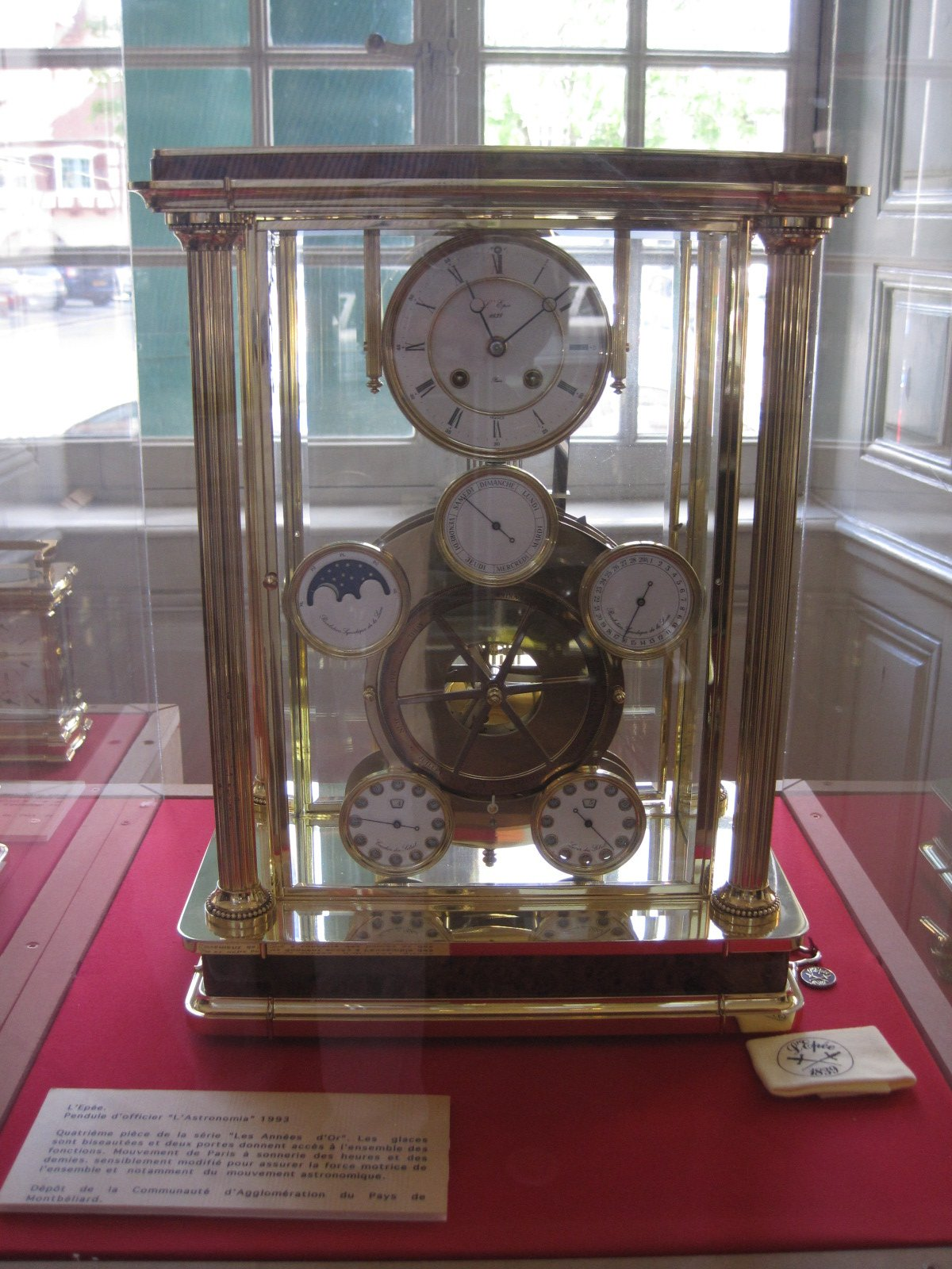 Hôtel Beurnier-Rossel - L’Épée - Pendule d'officier l'Astronomia - 1993